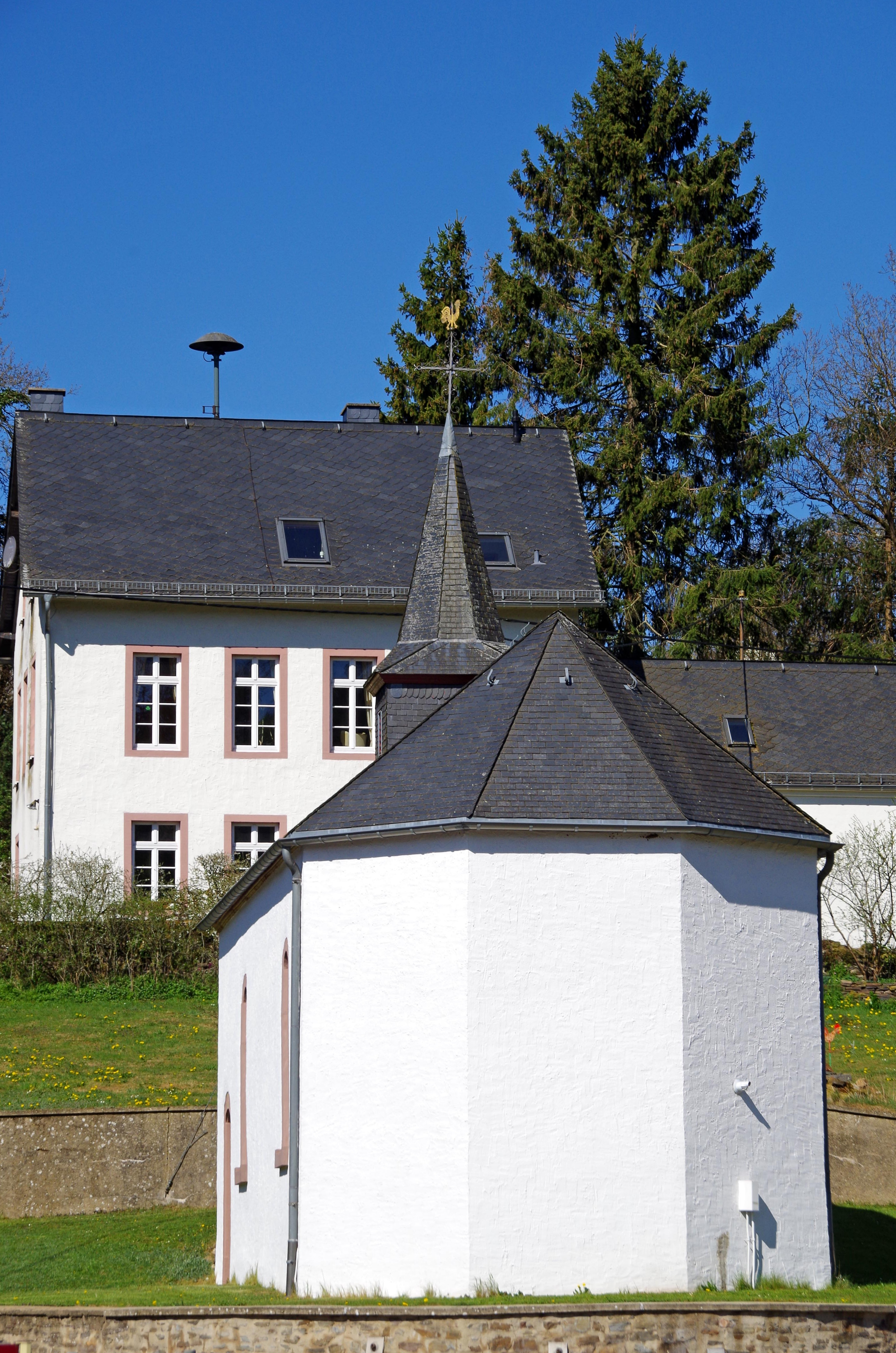 Sankt Eligius (Schlausenbach), Ostseite